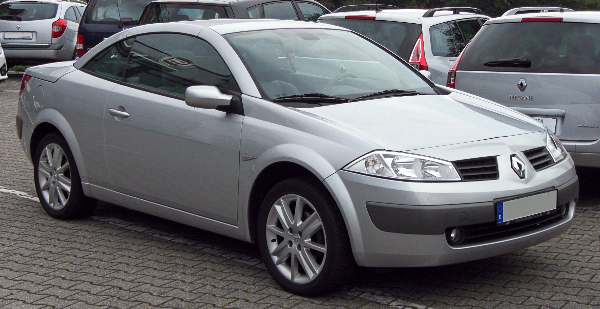 Renault Megane CC